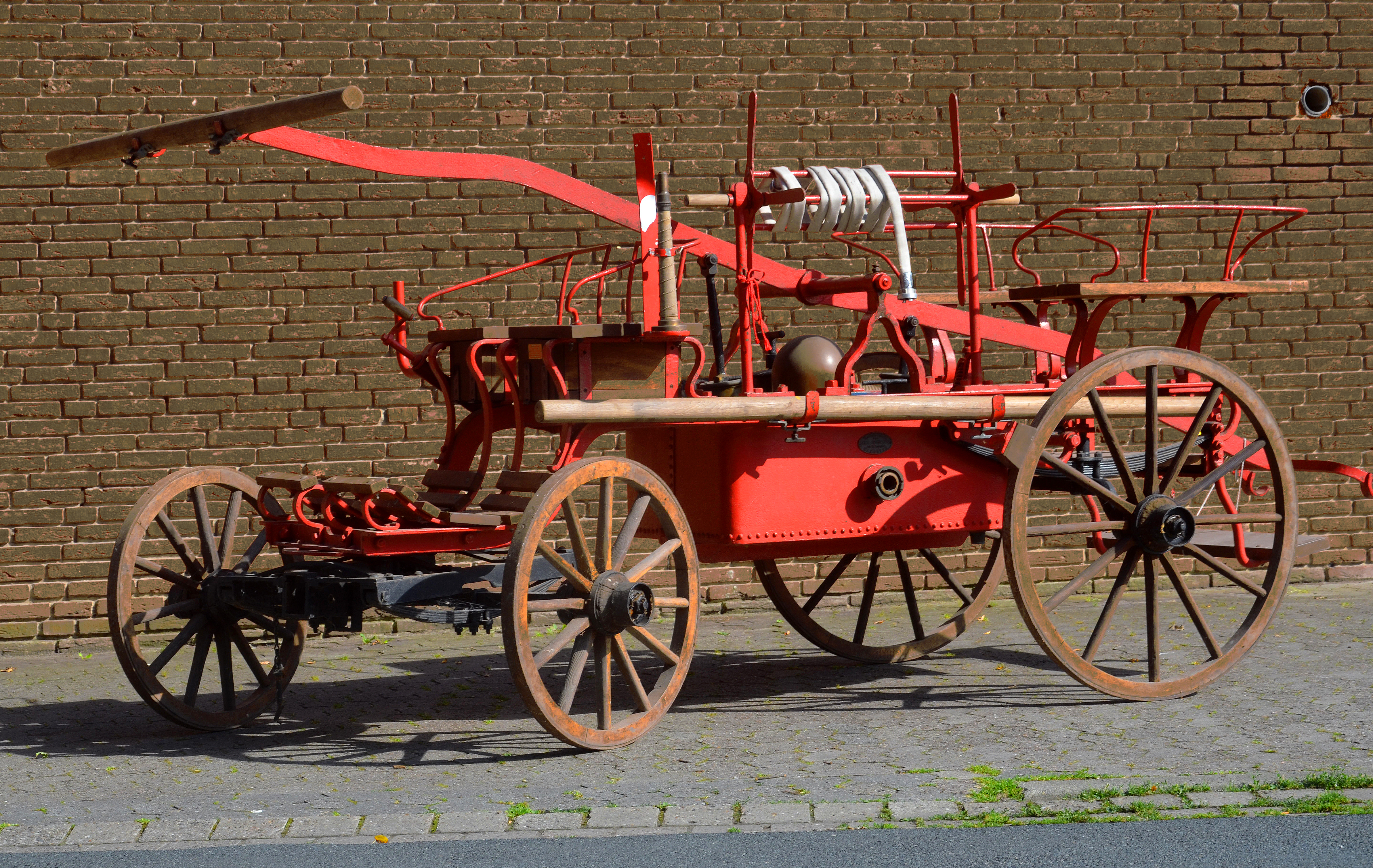 Nach langer Vorbereitung verabredeten sich Mitglieder vom Wikipedia-Büro Hannover am 18. Juli 2017 in Resse (Wedemark) mit Thomas Schmidt, dem stellvertretenden Ortsbrandmeister der Freiwilligen Feuerwehr Resse, für eine kleine Foto-Dokumentation des - denkmalgeschützten - Gerätehauses von 1870 und der historischen, originalen, voll funktionstüchtigen Handdruckspritze der „Spritzen-Fabrik von Chr. Spengler Inh. W. Spengler Hannover“ die laut dem Adreßbuch, Stadt- und Geschäftshandbuch der Königlichen Residenzstadt Hannover und der Stadt Linden beispielsweise von 1894 noch als „Spengler & Lohmann, Feuerspritzenfabrik“ zugleich als Schmiede und Schlosserei unter der - damaligen - Adresse Engelbostelerdamm 21a ihren Sitz hatte ...